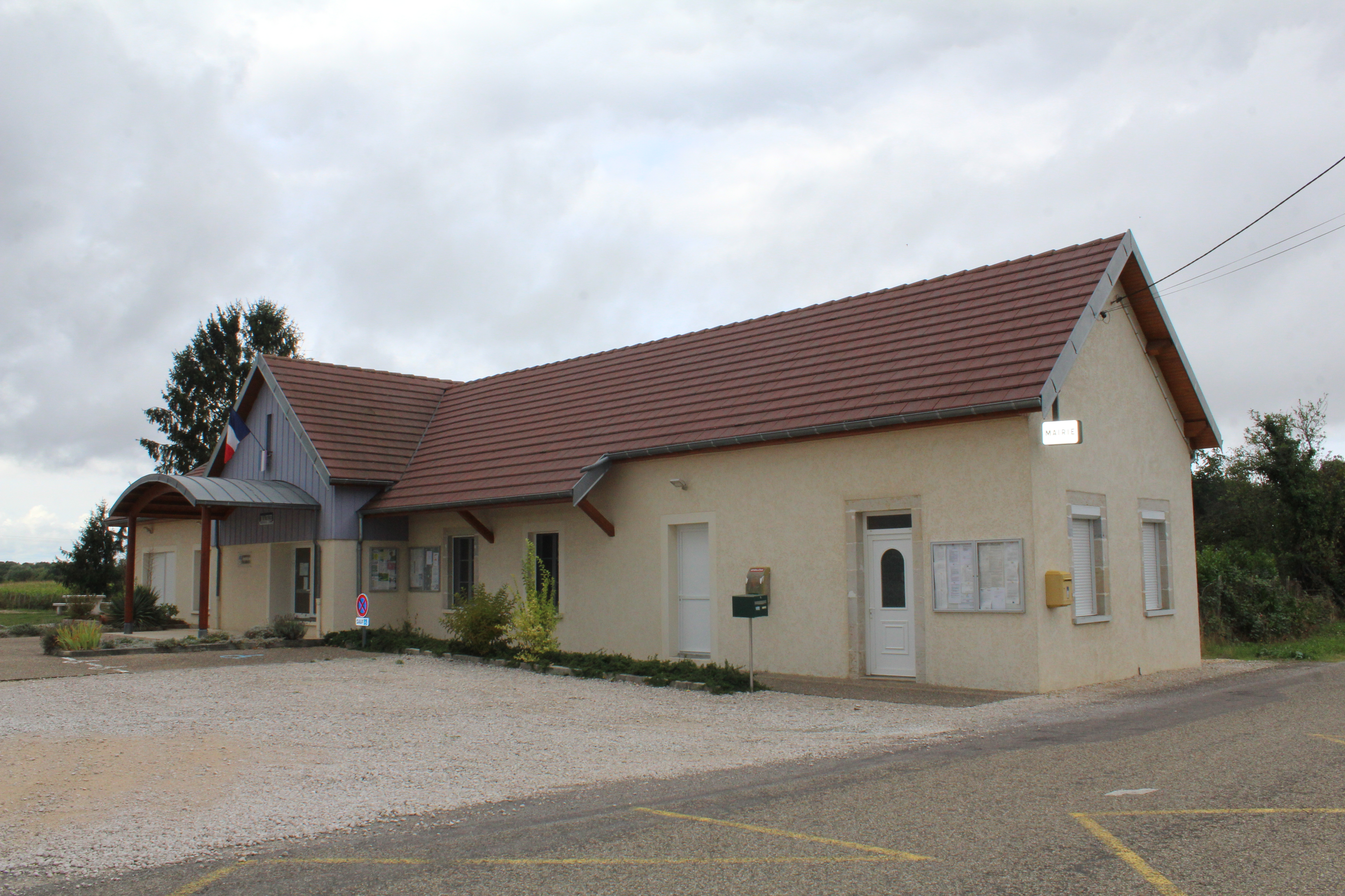 Mairie de Balaiseaux.